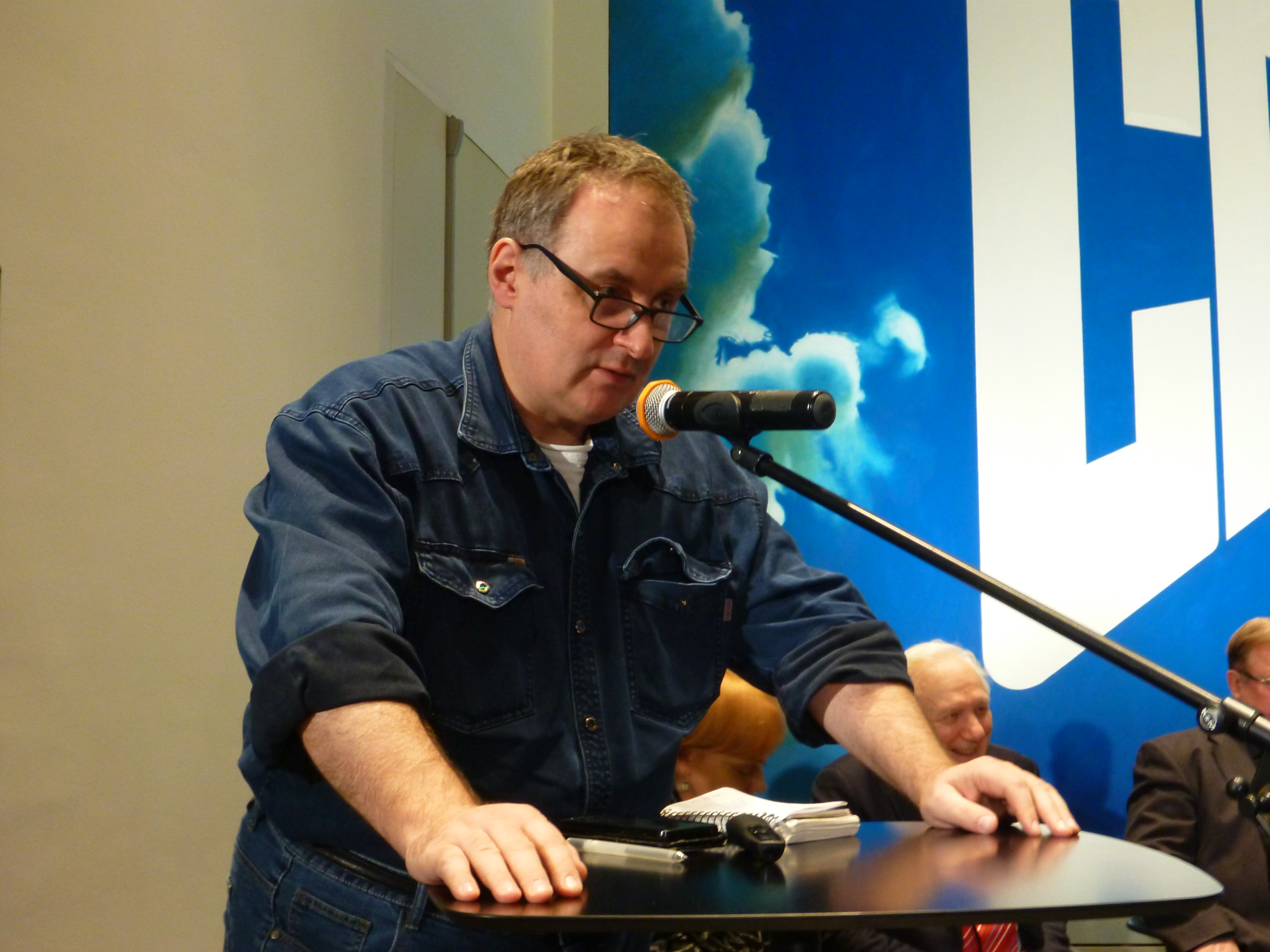 Александр Владимирович Черкасов председатель Совета правозащитного центра Мемориал в Ельцин-центре, 9 декабря 2019 года